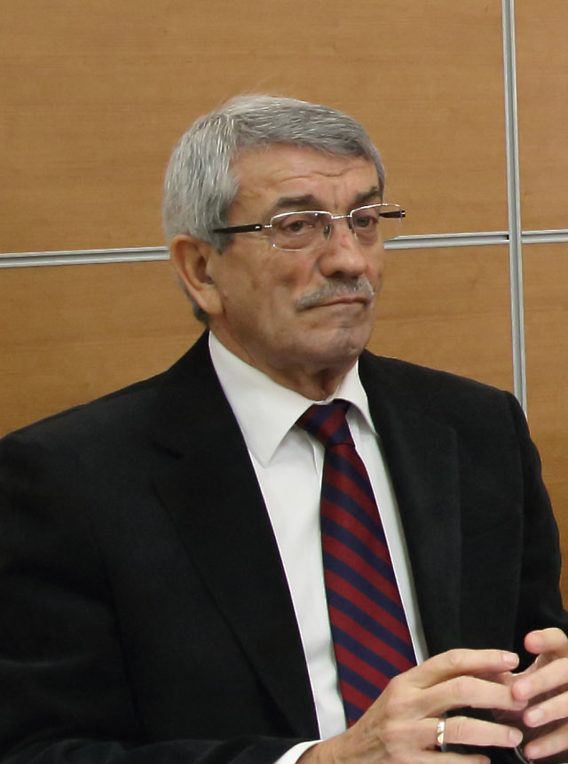 Toledo, 21-01-2016.- El director general de Empresas, Competitividad e Innovación, de la Consejería de Economía, Empresas y Empleo, Javier Rosell, durante su intervención en el acto de celebración del Día Internacional de la Mediación, junto al decano del Colegio de Abogados de Toledo, José Sánchez Recuero (c); el presidente de la Corte de Arbitraje y Mediación, Joaquín Sánchez Garrido (i); el Juez Decano de Toledo, Juan Ramón Brigidano Martínez (2d) y el vicepresidente de la Cámara de Comercio, Pedro Hermida (d), en la sede del Colegio de Abogados de Toledo. (Foto: Álvaro Ruiz // JCCM)